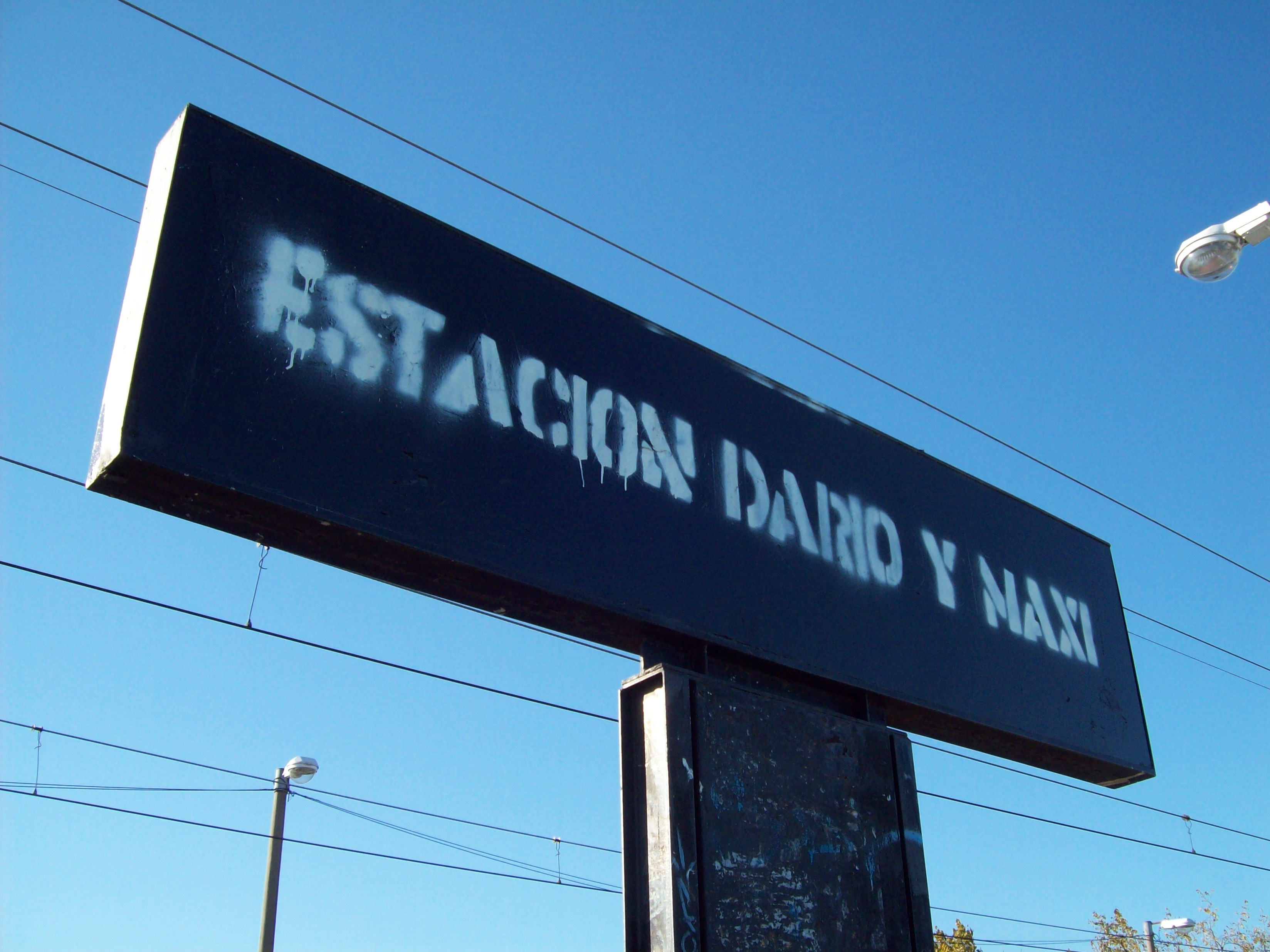 Estación Darío y Maxi - Nomenclátor con estarcido.